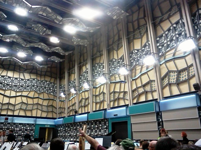 Nová zkušebna Českého rozhlasu